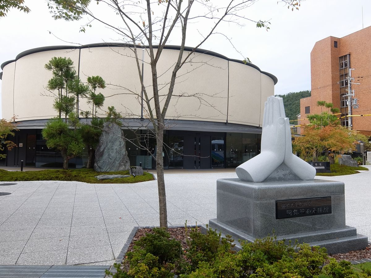 佛教大学紫野キャンパス、礼拝堂（水谷幸正記念館）